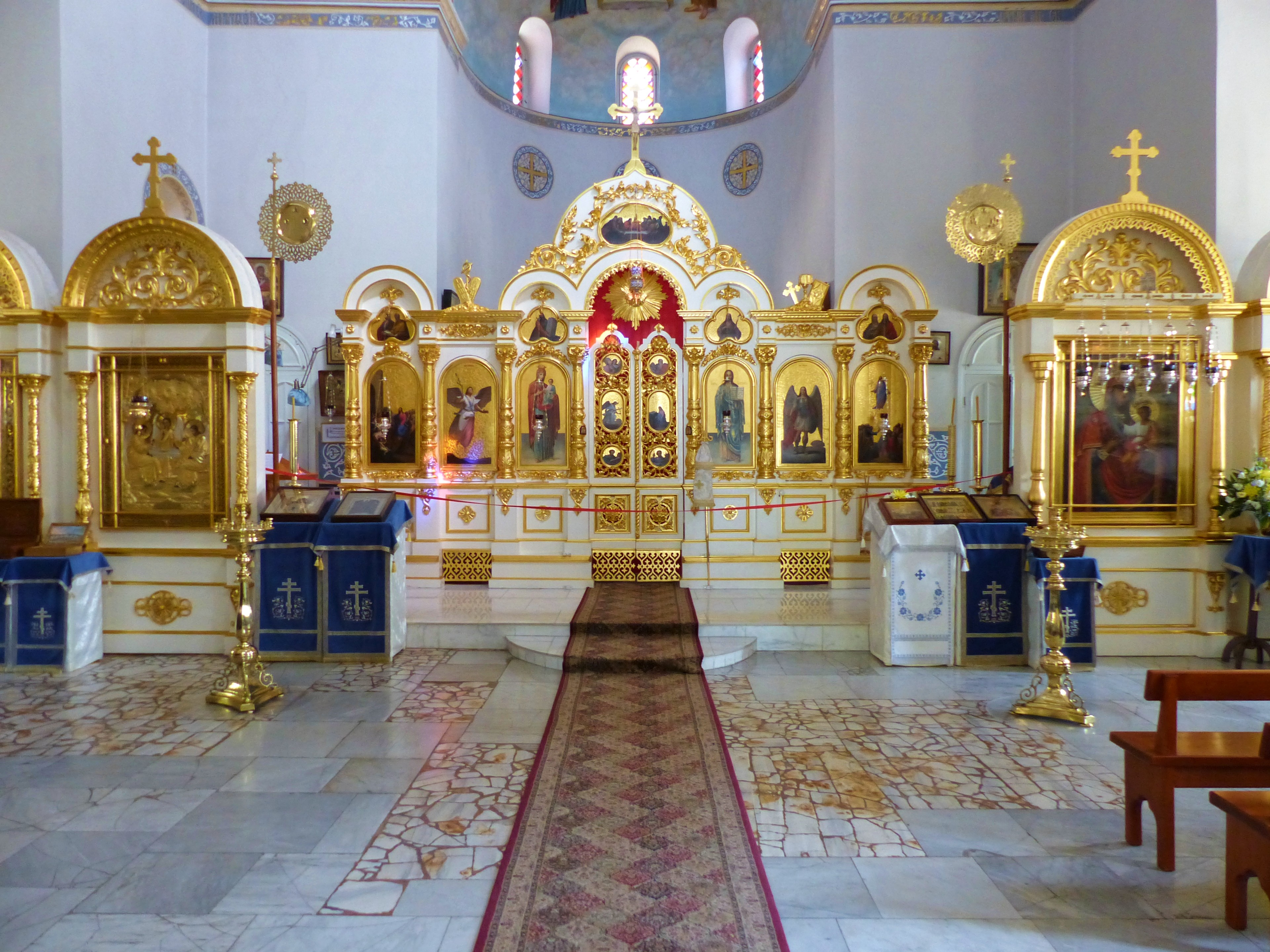 Monasterio ruso de la Ascensión en el Monte de los Olivos, Jerusalén.